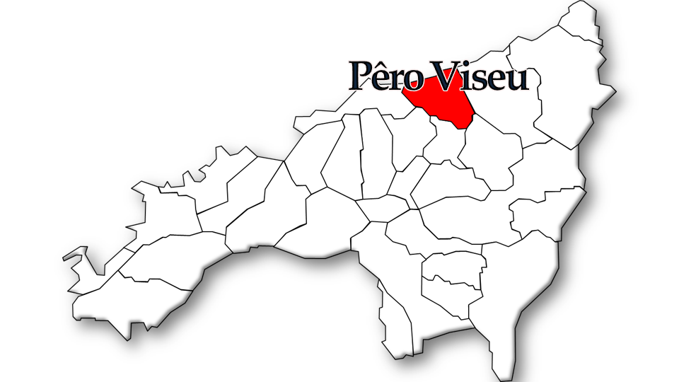 População